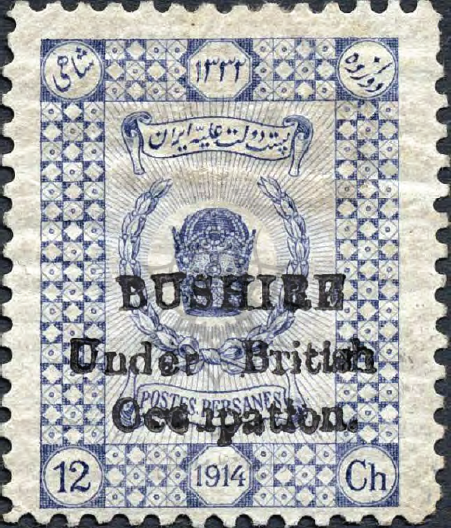 تمبر ۱۲ شاهی دولت علّیه ایران، چاپ ۱۳۳۲ ق.، منقش به تاج کیانی و ممهور به عبارت «BUSHIRE Under British Occupation» (بوشهر تحت اشغال بریتانیا) که پس از اشغال بوشهر در سال ۱۹۱۵ توسط ارتش بریتانیا مهر شده‌است.